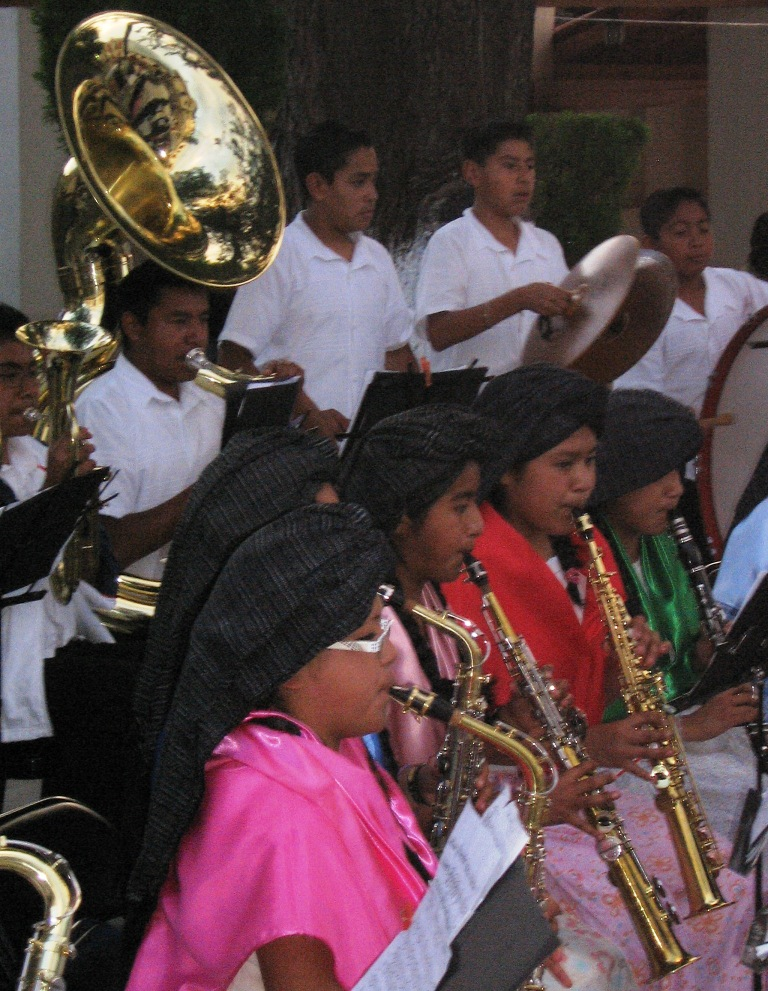 Música popular y tradicional en Capulálpam de Méndez, interpretada por bandas juveniles